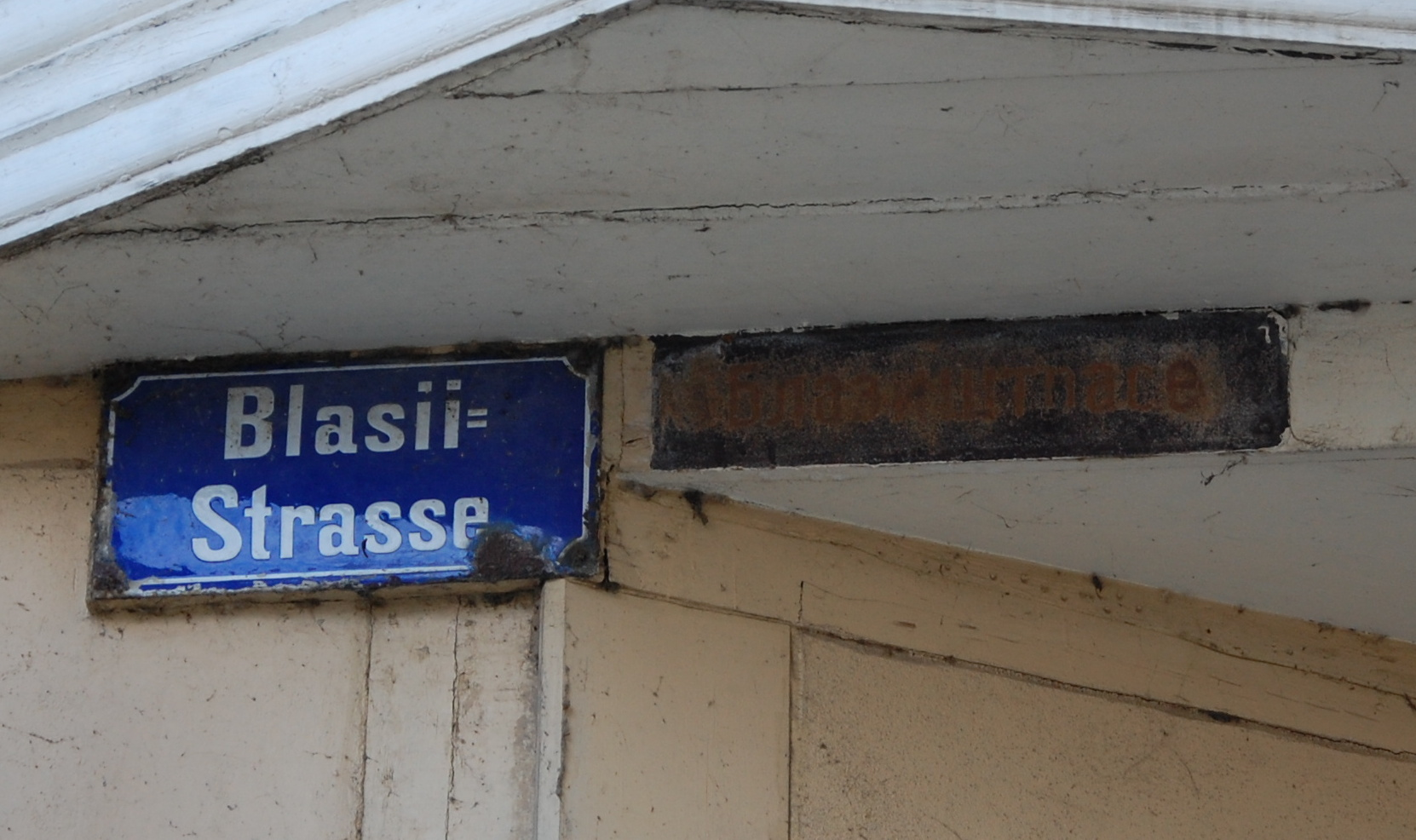 Straßenschilder am Haus Blasiistraße 16 in Quedlinburg (rechts eines mit kyrillischer Schrift)